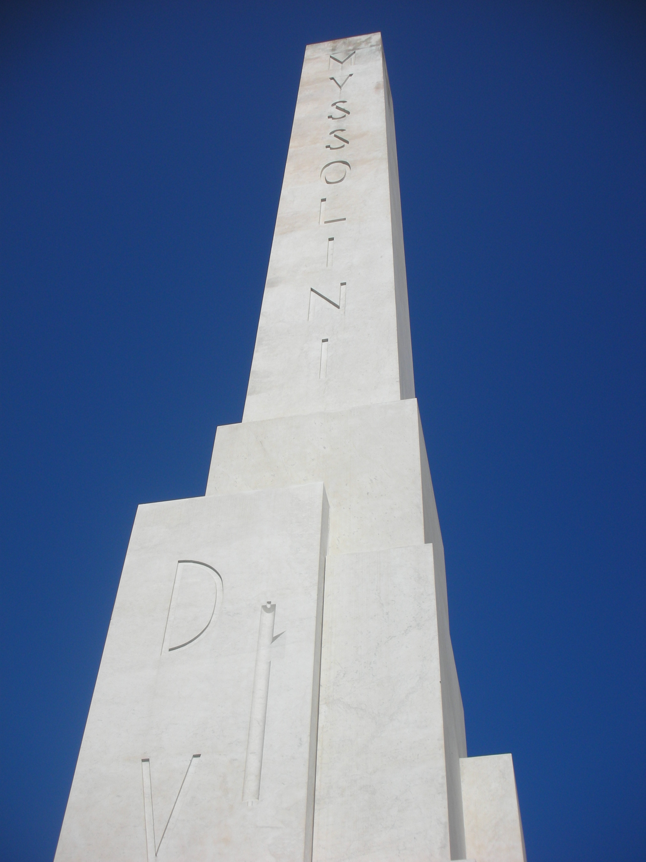 Monolite presso il Foro Italico (già Foro Mussolini)